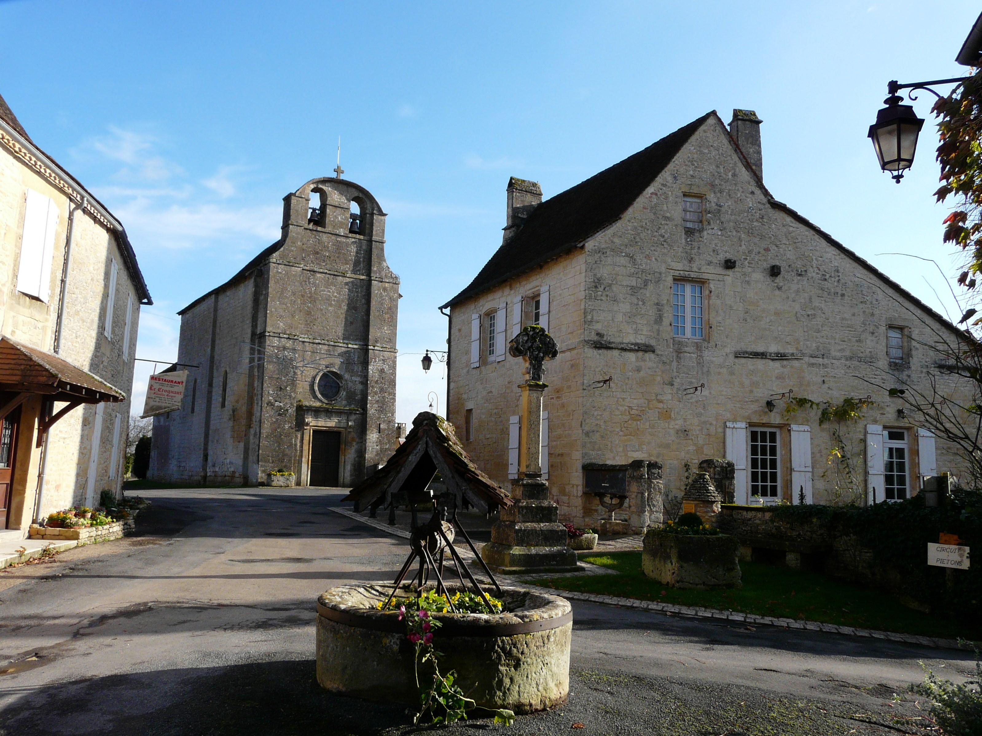 Puits dans le bourg de Fanlac, Dordogne, France.